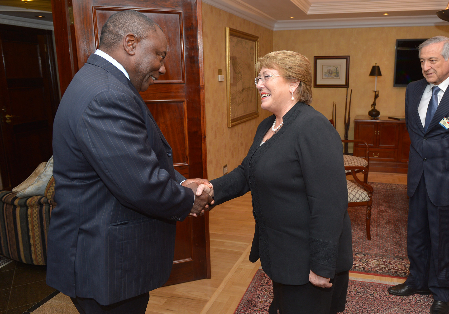 Gobierno de Chile